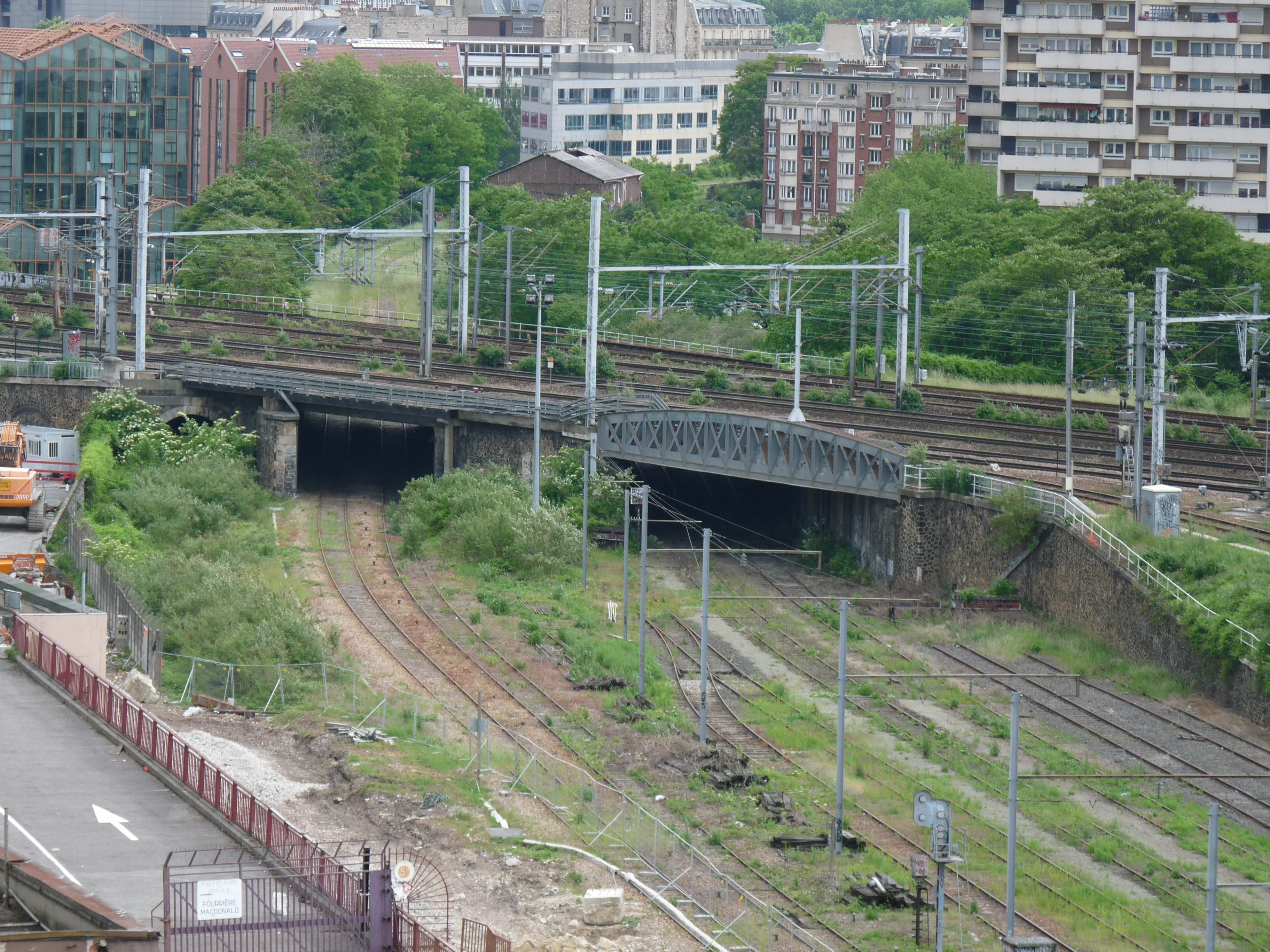 Les voies de l'ancien chemin de fer de la petite ceinture passent au-dessous des voies de la gare de l'est, derrière les entrepôts Macdonald dans le 19e arrondissement de Paris.